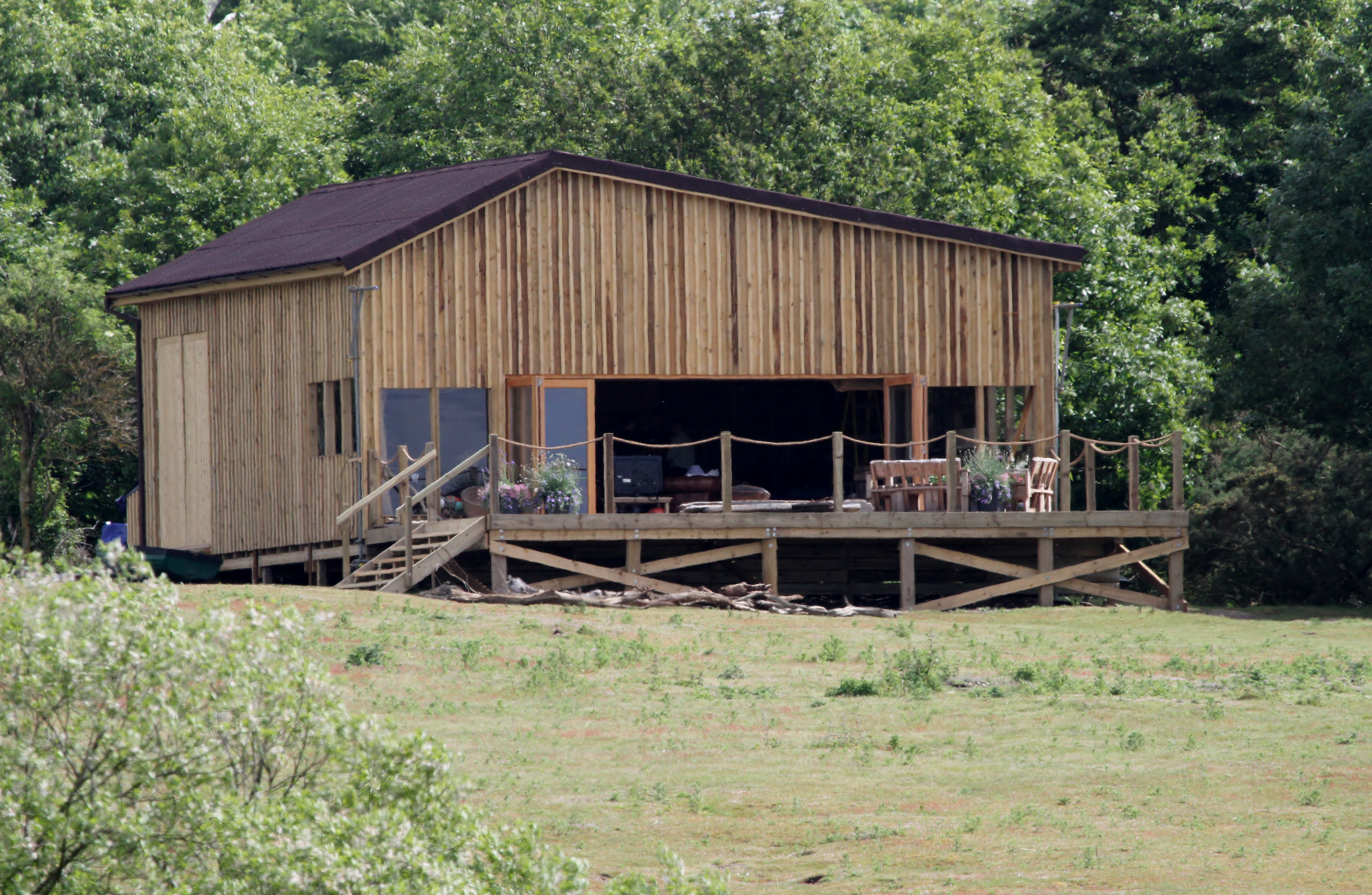 Taken at RSPB Minsmere